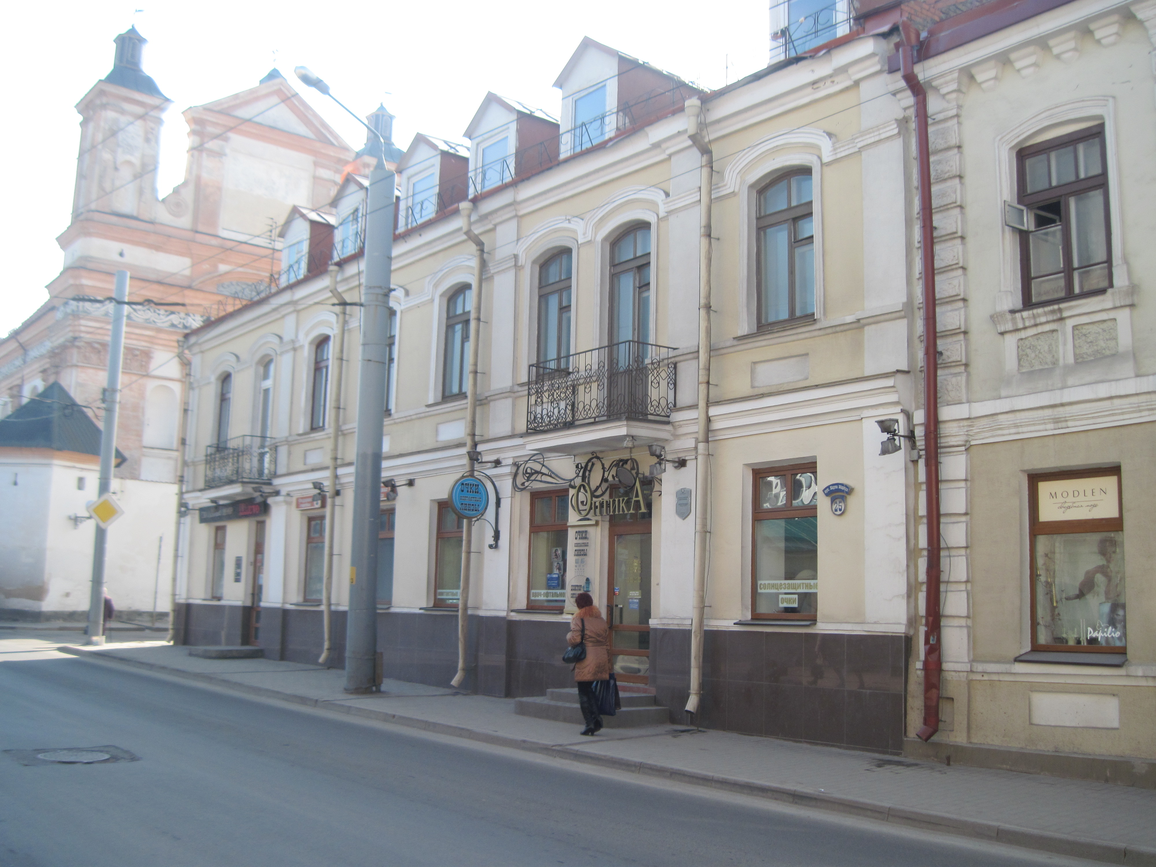 Забудова гістарычнага цэнтра Гродна. Вуліца К. Маркса, 25